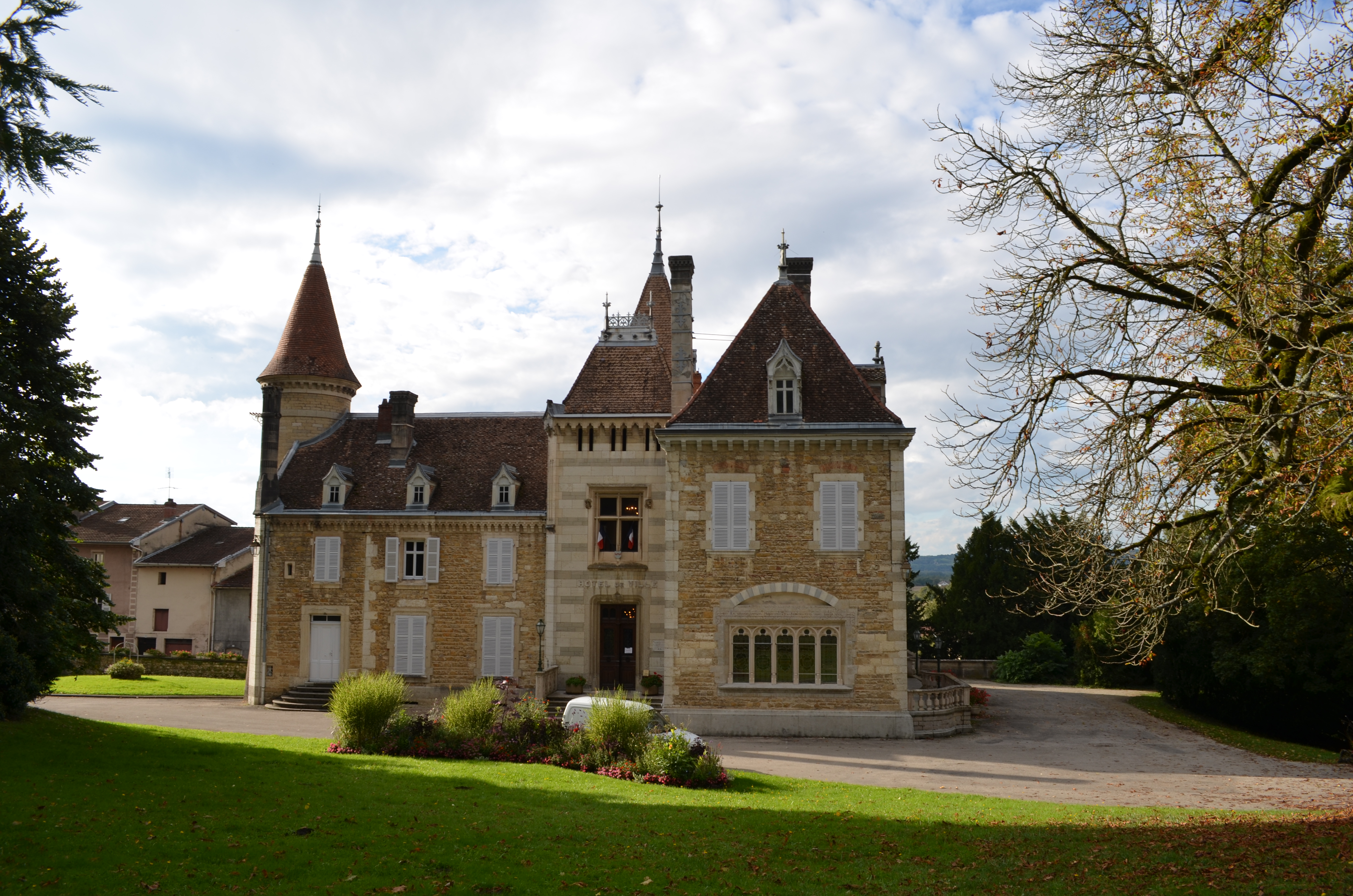 Mairie d'Ambronay.